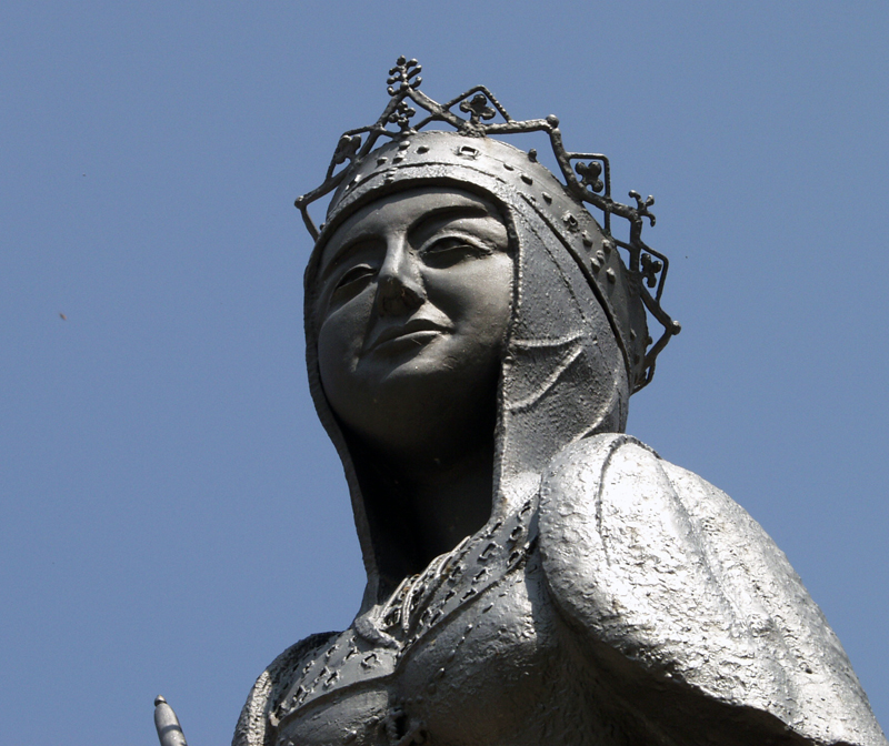 Estatua de Isabel la Católica en Madrigal de las Altas Torres (provincia de Avila)